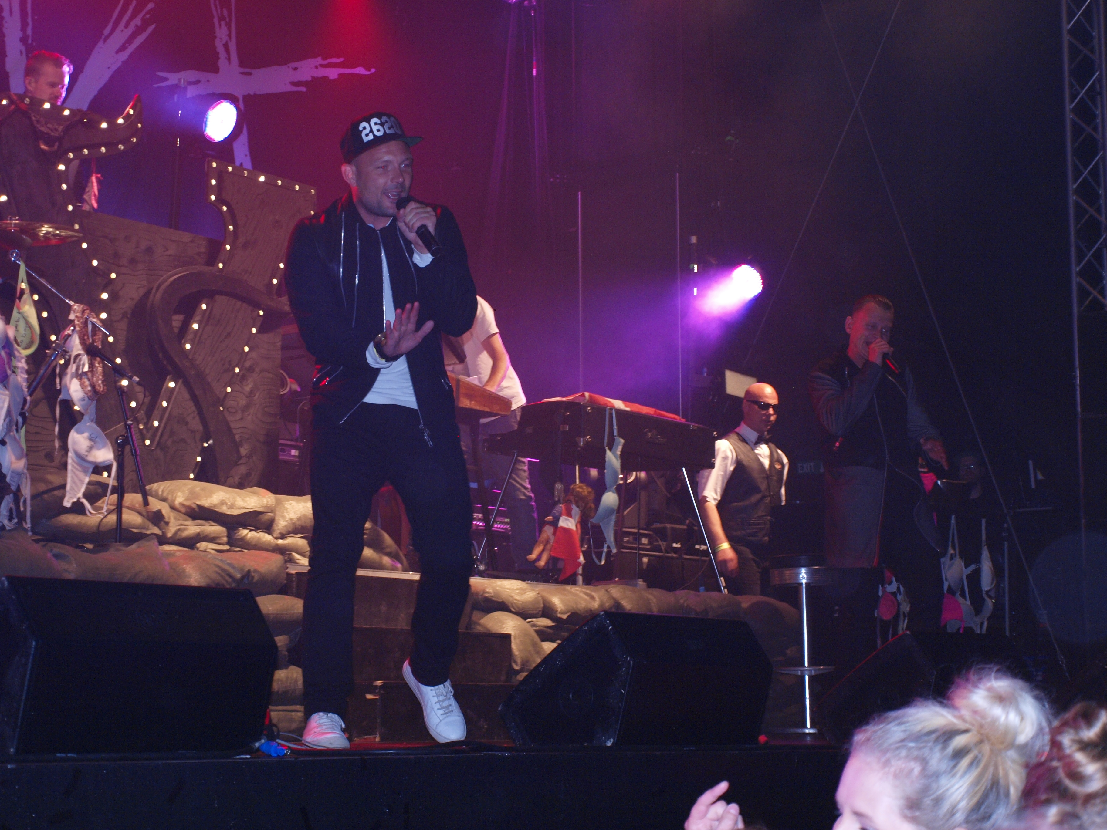 Suspekt under koncerten Studierock i Kolding, 4. september 2015